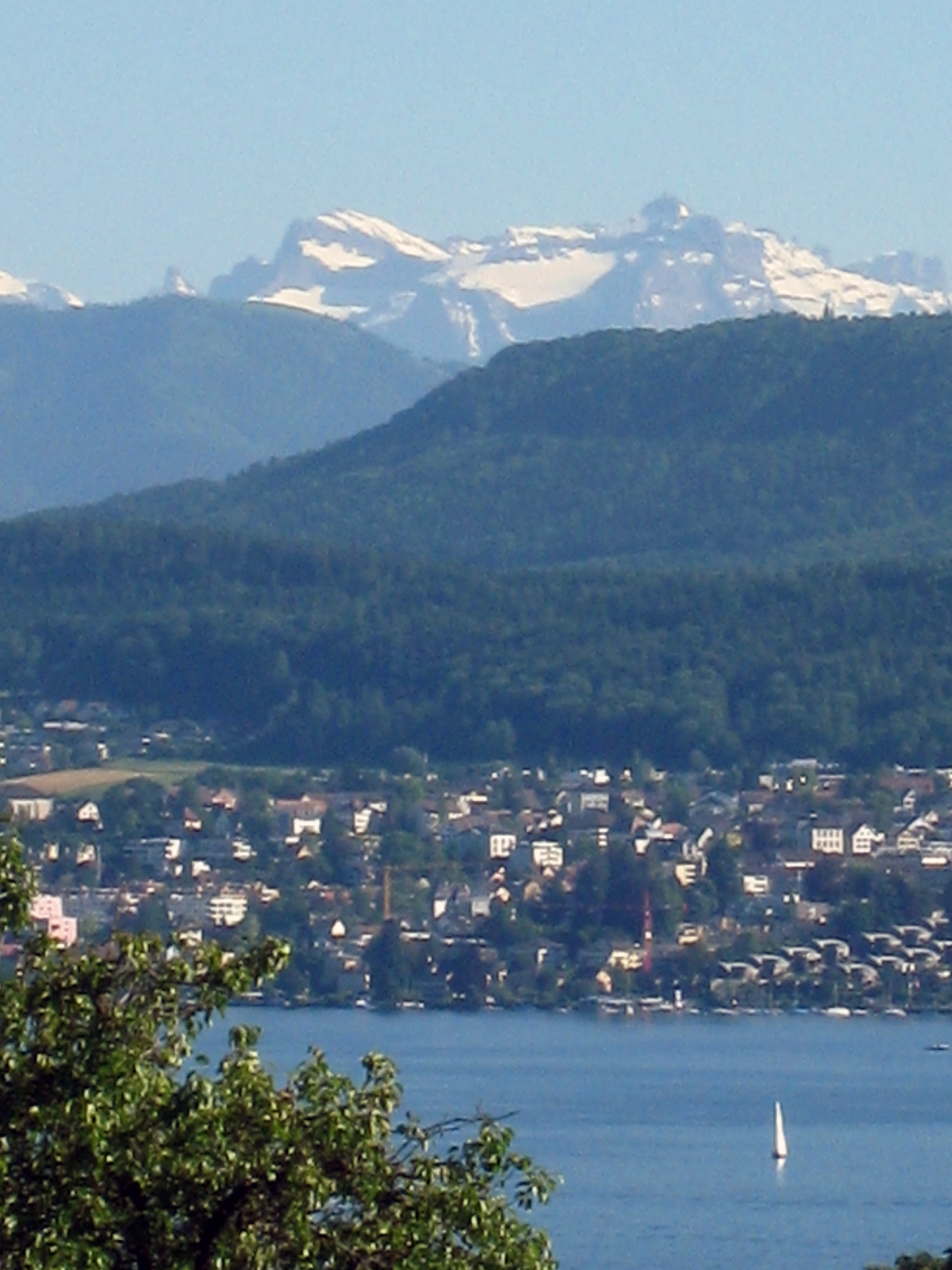 Brunnistock und Uri Rotstock mit Zürichsee und Thalwil